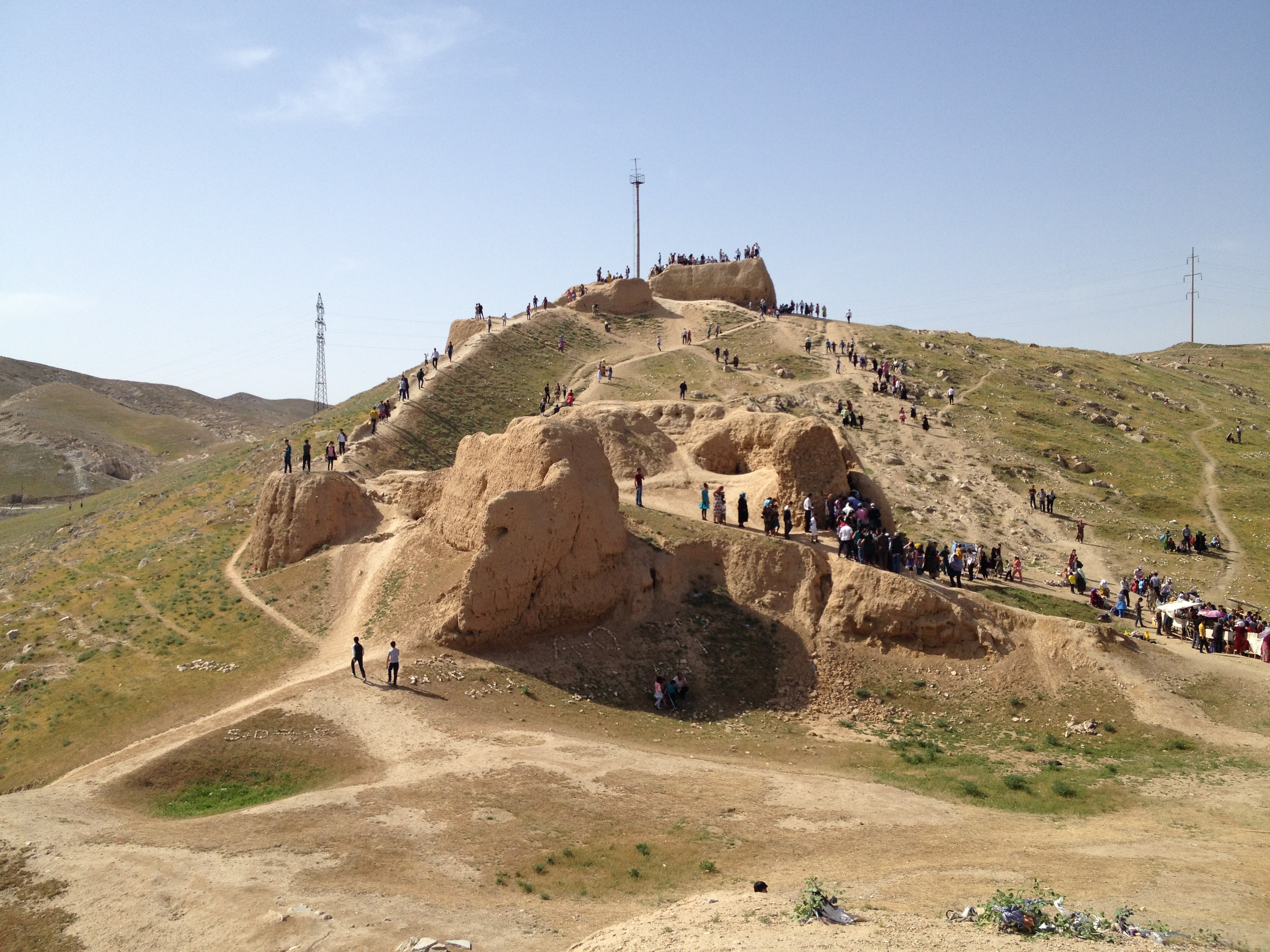 Развалины крепости Нурата